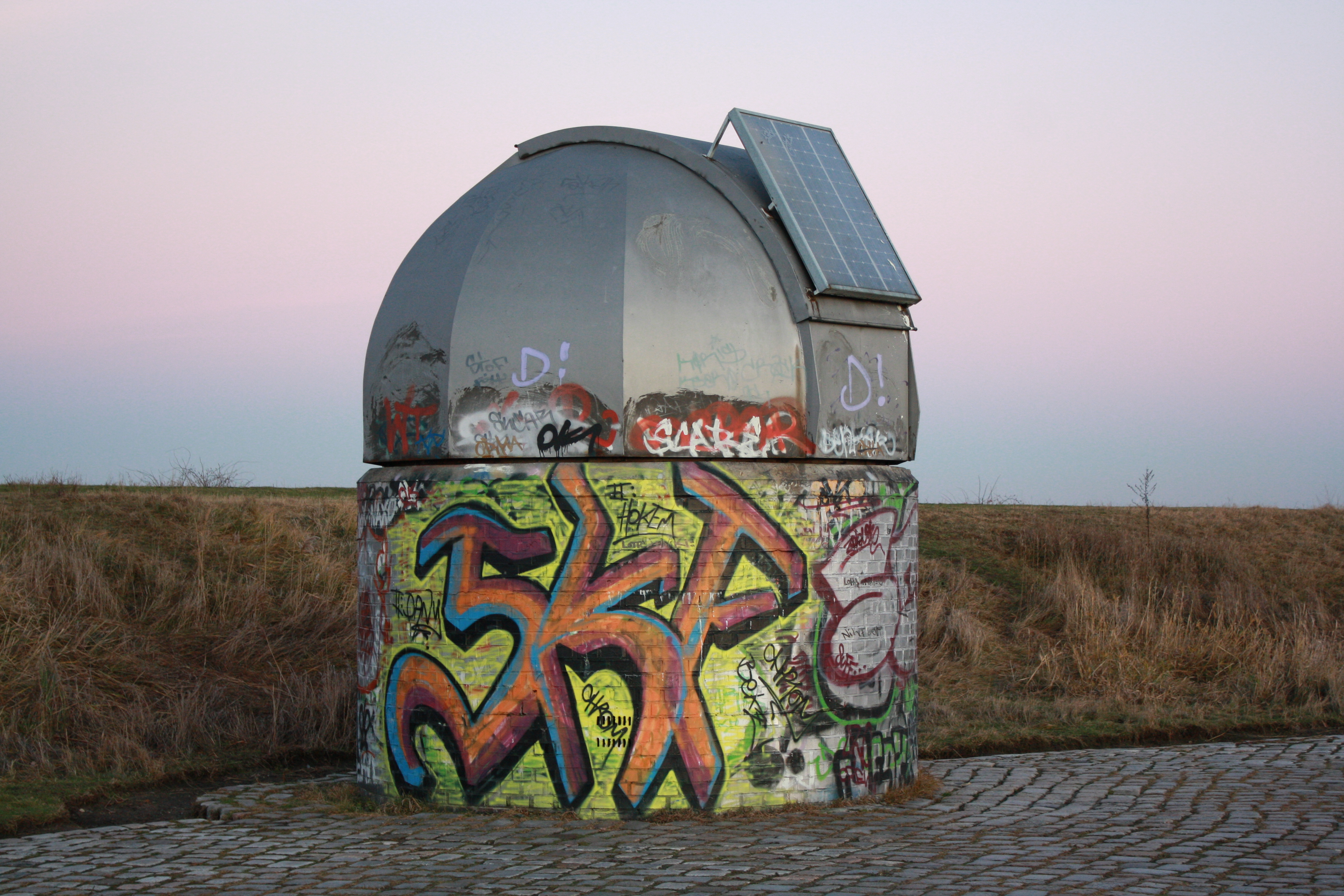 Foto der Bruno-H.-Bürgel-Sternwarte vom 25. Dezember 2008